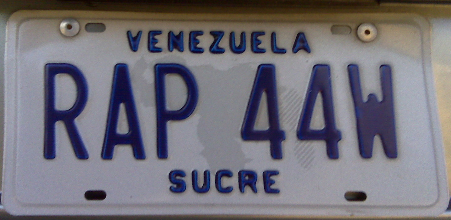 Placas de automotores Venezuela